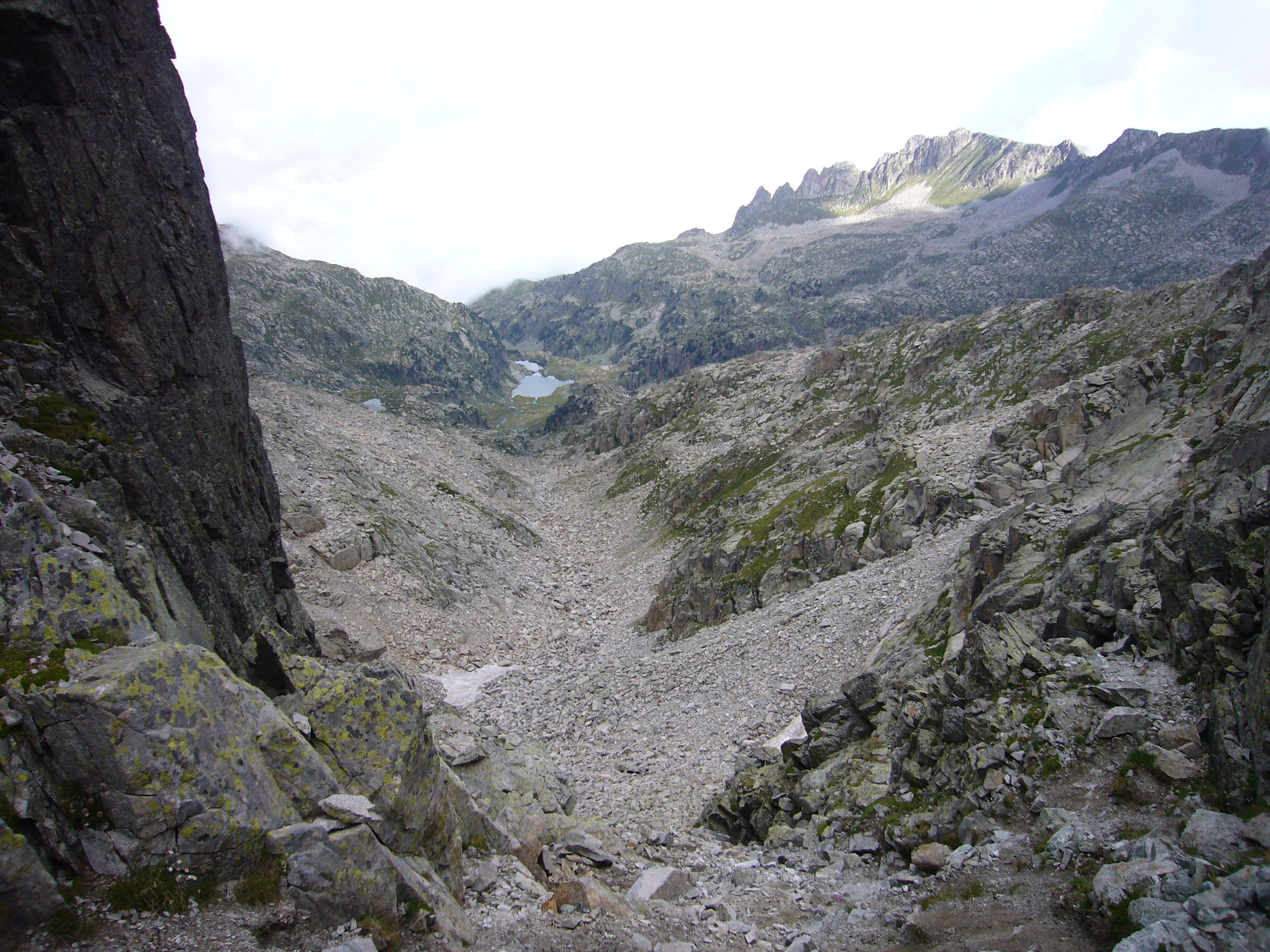 Vall de Colieto vista desde el Collet de Contraix, la Vall de Boí, Alta Ribagorça, Catalunya